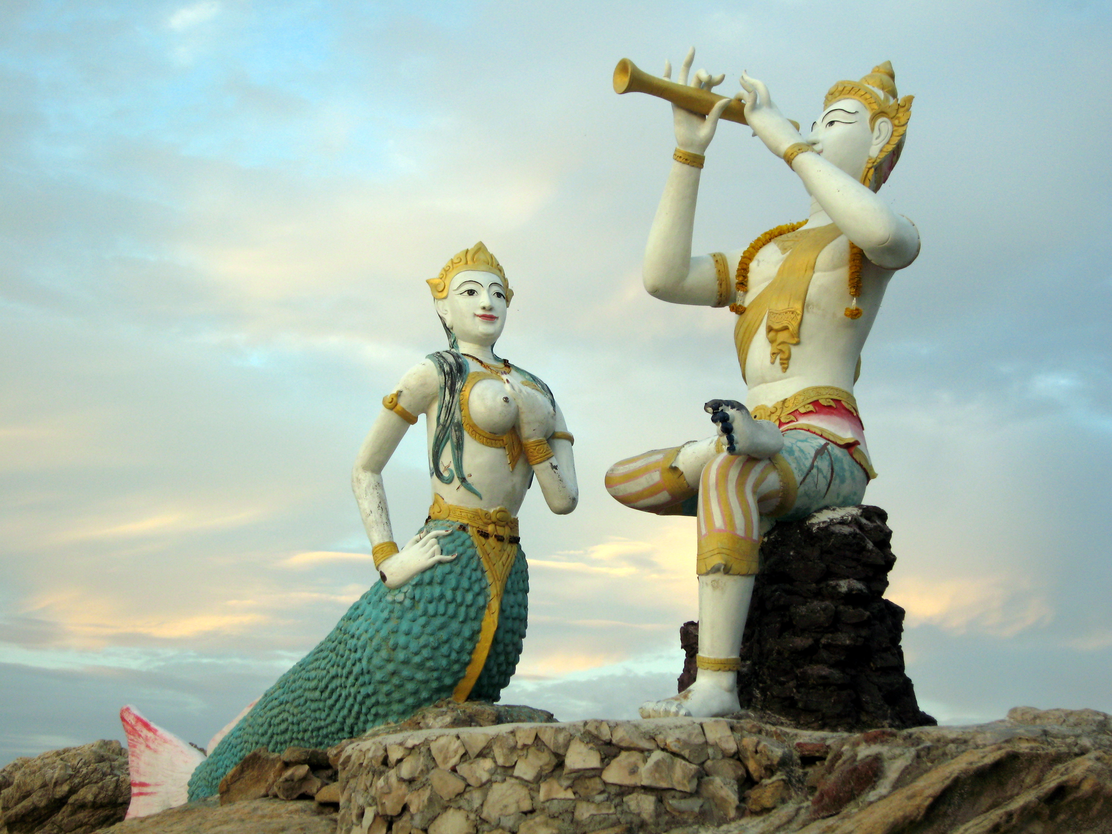 Sunrise on Hat Saikaew, Koh Samet